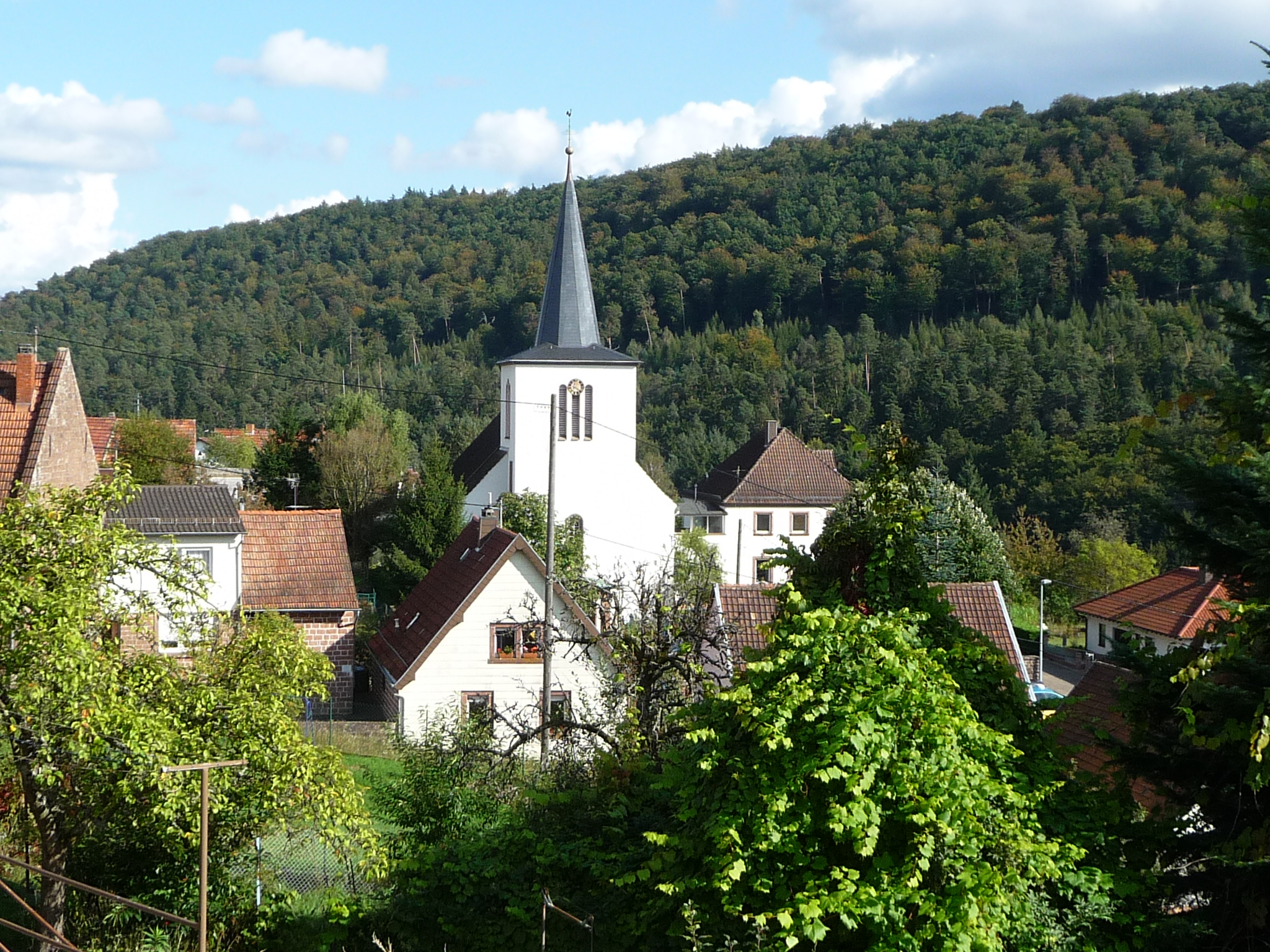 Iggelbach ist ein Ortsteil der Gemeinde Elmstein im rheinland-pfälzischen Landkreis Bad Dürkheim und hat ca. 800 Einwohner.